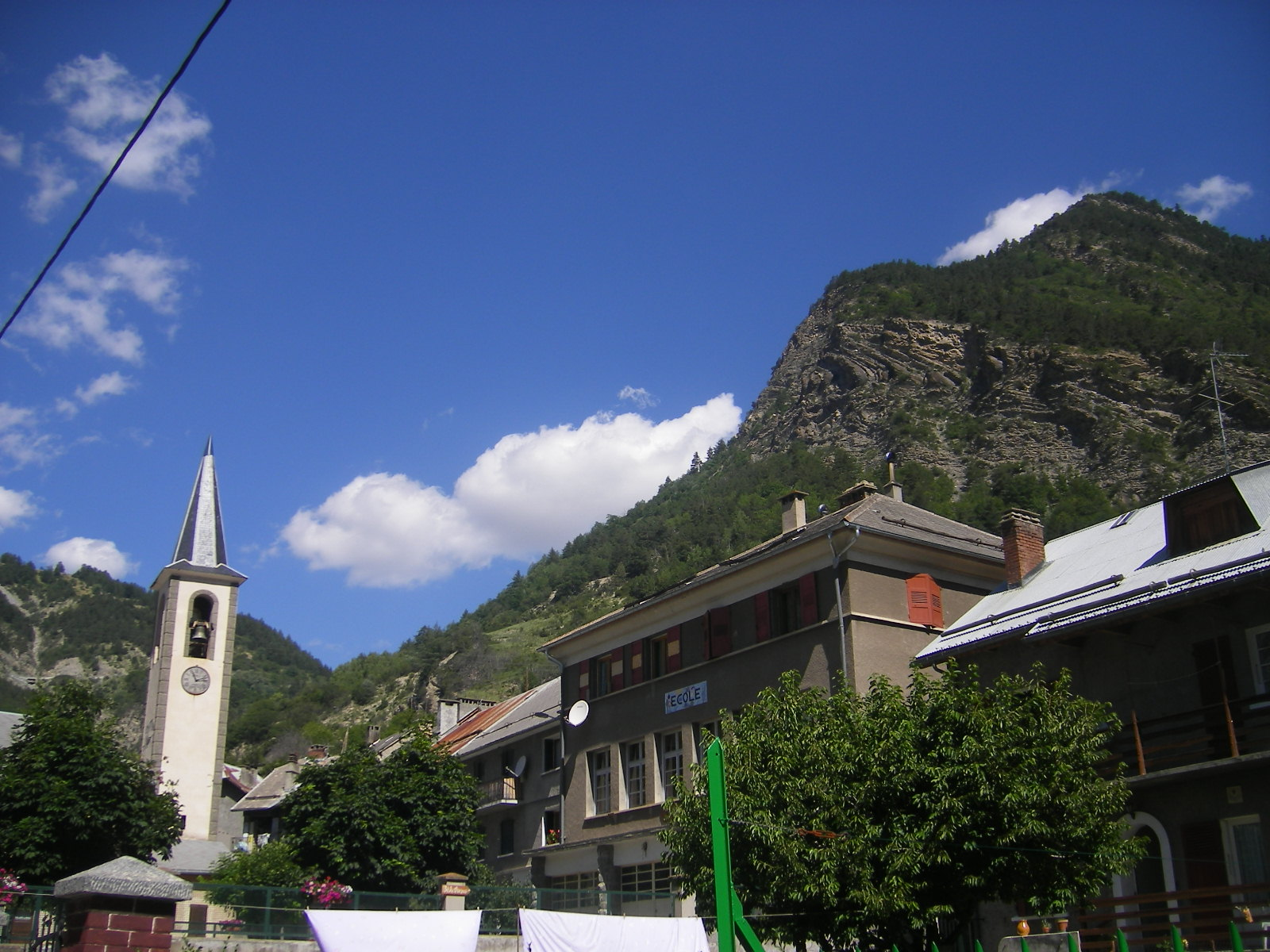 La Condamine-Châtelard, à gauche: la tour de l'église paroissale Sainte Catherine